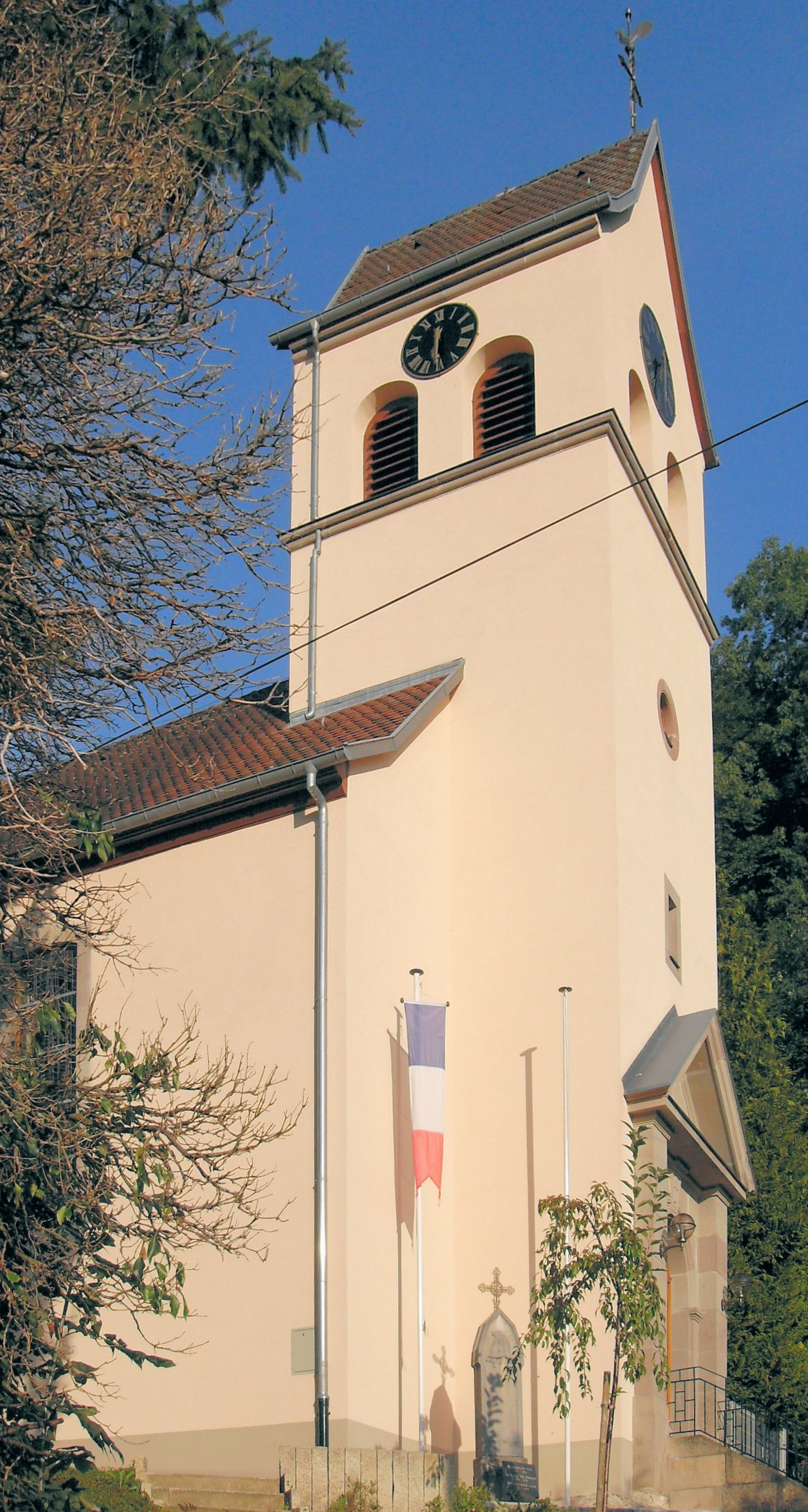 L'eglise Saint-Michel à Biederthal, côté sud-ouest